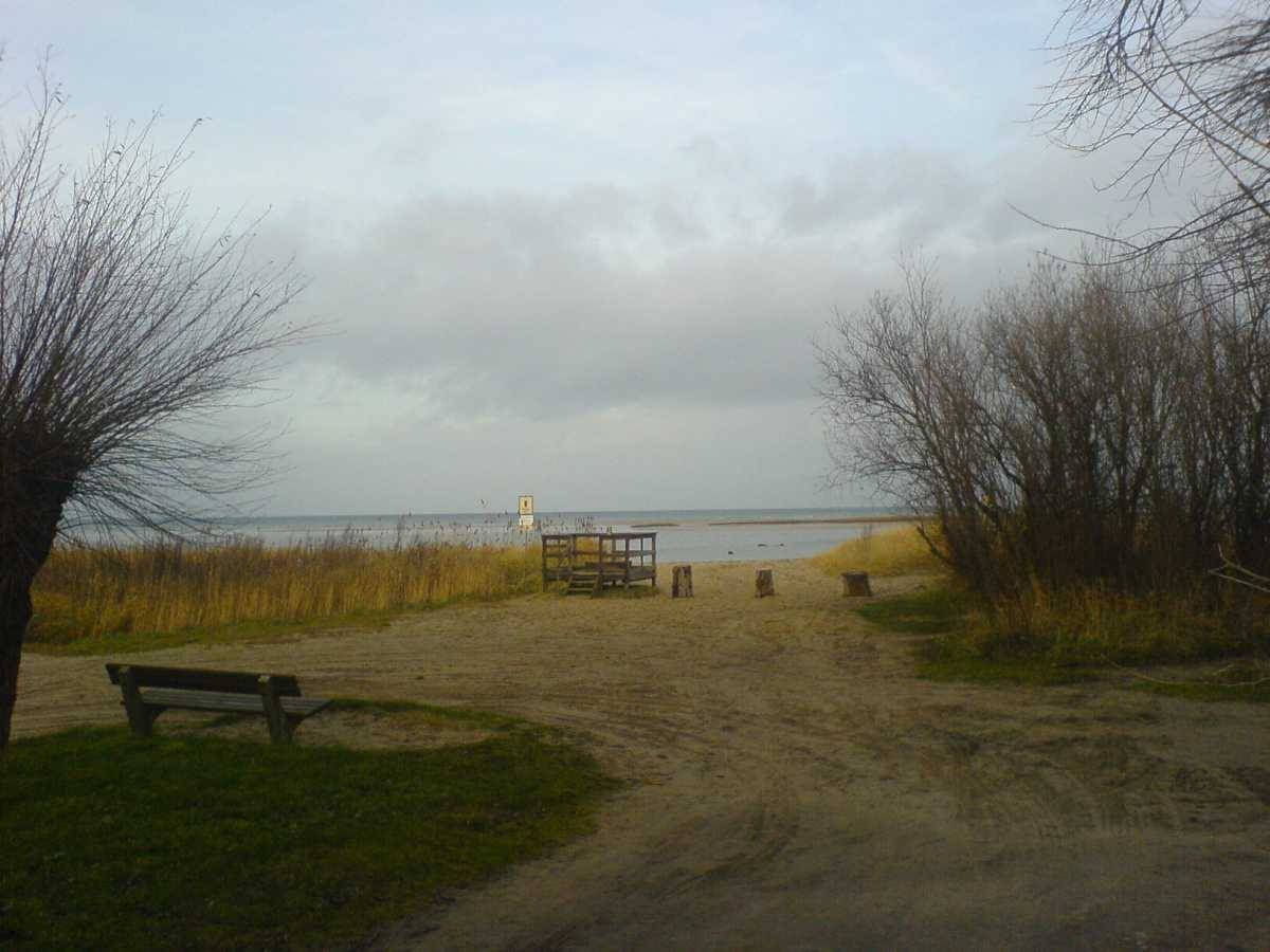 Vogelinsel Langenwerder